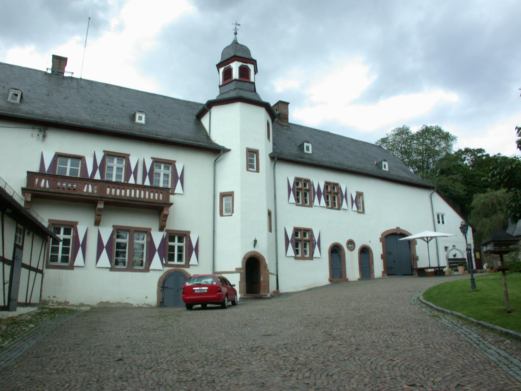 Hauptgebäude Schloss Neuweilnau, Weilrod, Hessen, Deutschland, u.a. Geburtsort von Philipp III. (Nassau-Weilburg) (1504-1559), dem Erbauer der Residenz Weilburg. Es wurde von einem seiner Söhne, Philipp IV. (Nassau-Weilburg) (1542-1602), von 1564-1566 als Residenz ausgebaut, bevor dieser 1571 seine Residenz von Neuweilnau nach Saarbrücken wegen eines Erbfalls verlegte.